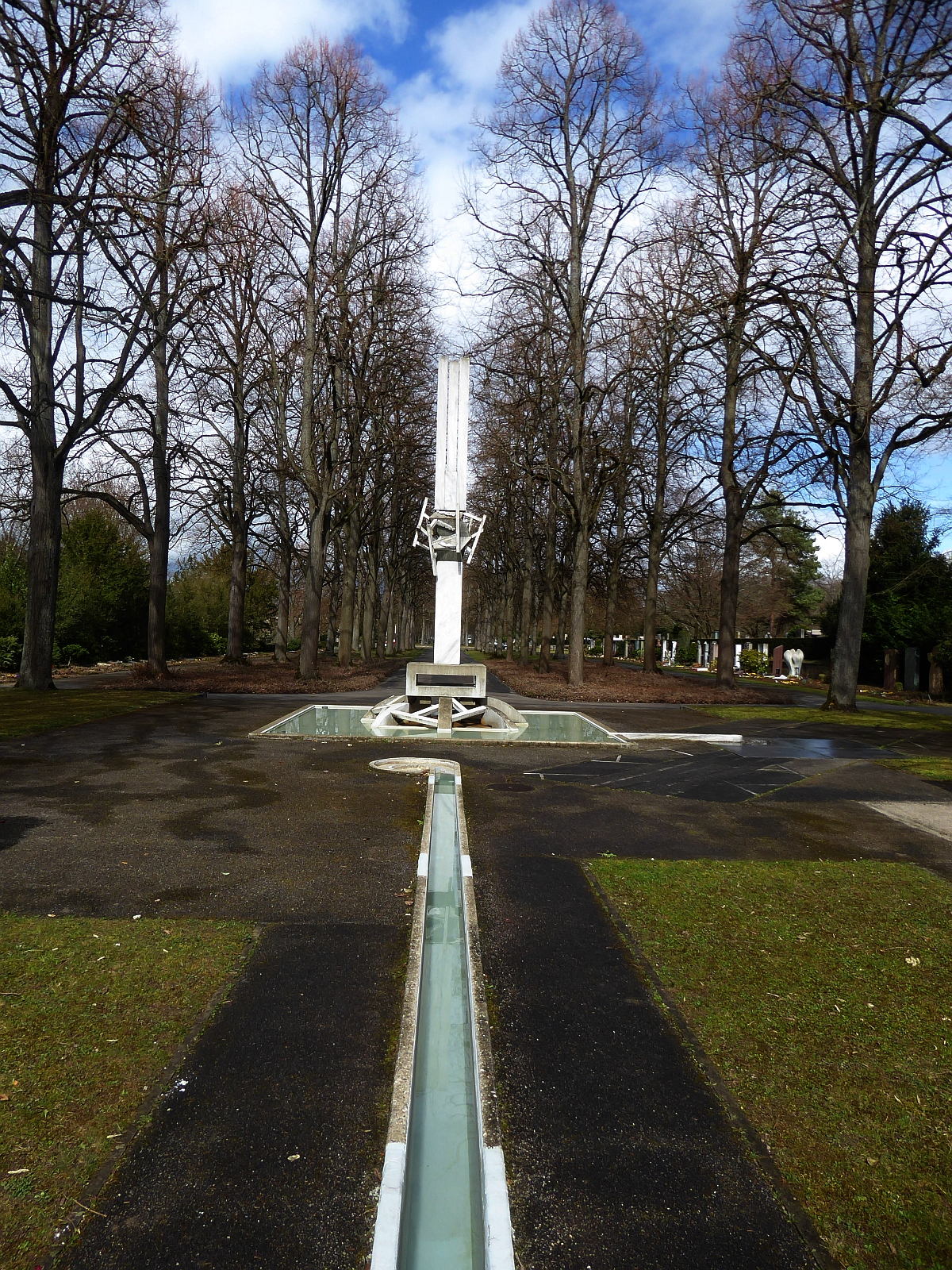 Ludwig Stocker, Skulptur, Gestaltung, Offener Raum-1987, auf dem Friedhof Hörnli, Riehen, Basel-Stadt